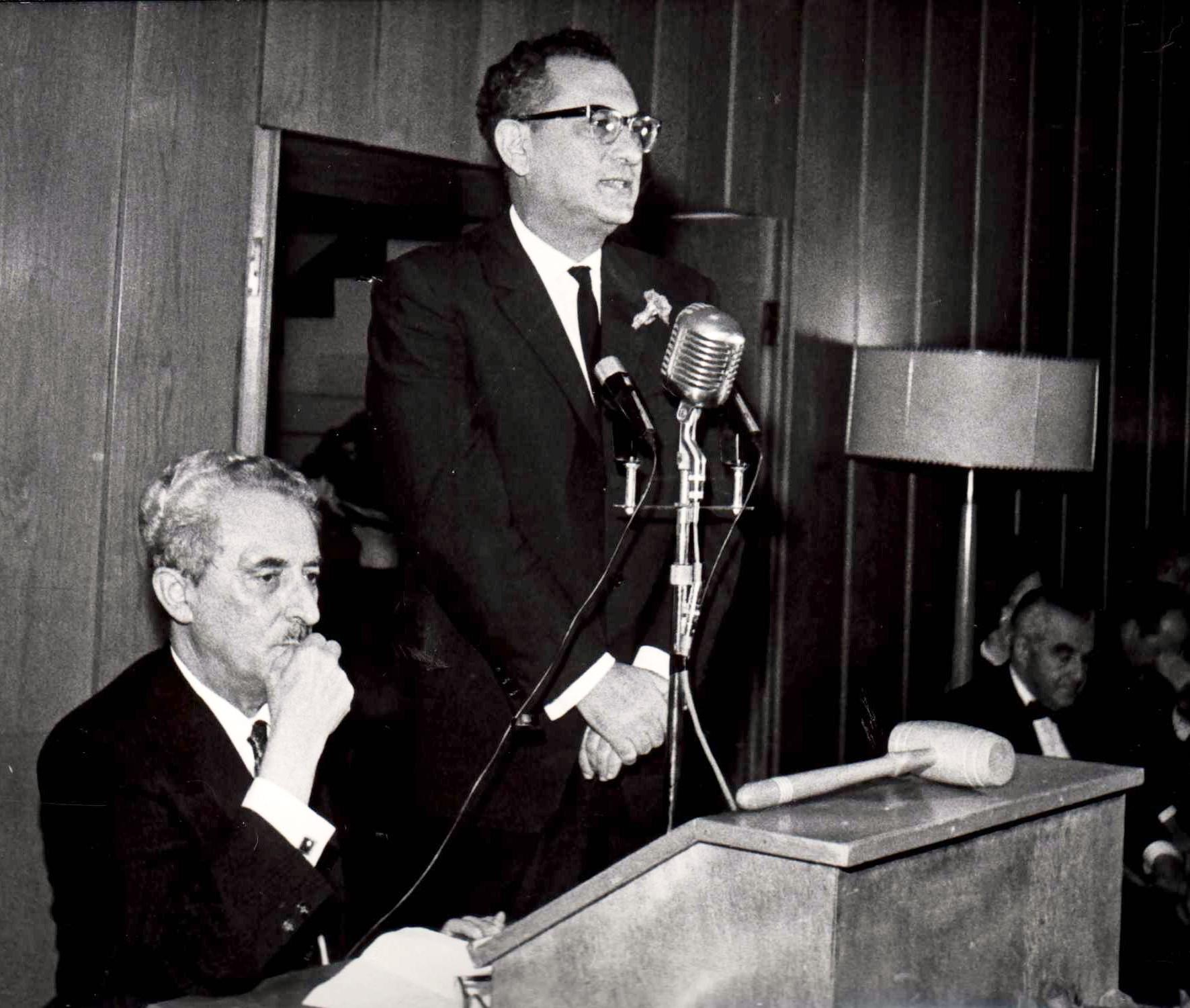 משה שרת, ראש הממשלה השני, יושב ליד יצחק כץ במפגש ברחובות